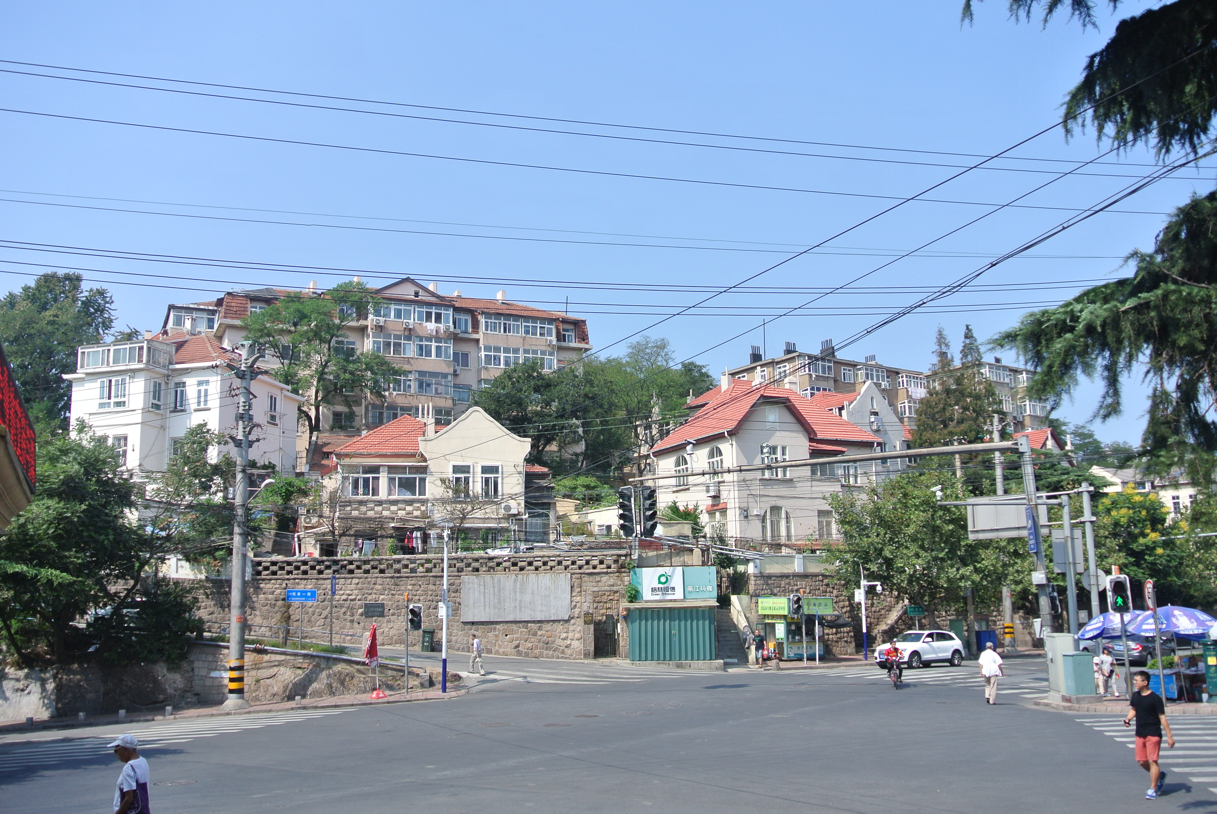 青岛江苏路观象一路路口